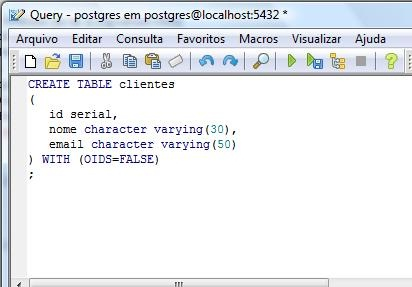 Монгол: Хүснэгт үүсгэх